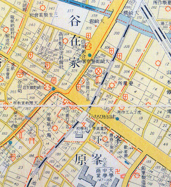 東京府荏原郡大崎町の地図の一部、1925年前後